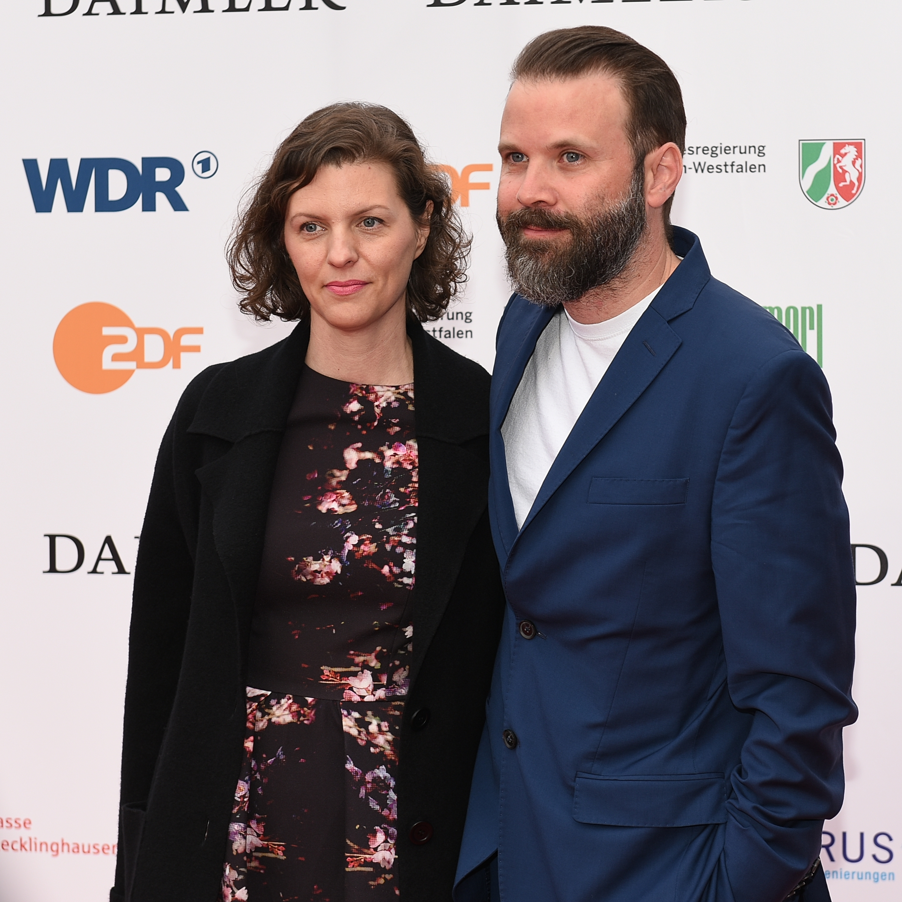 Verleihung des Grimme-Preises 2018.